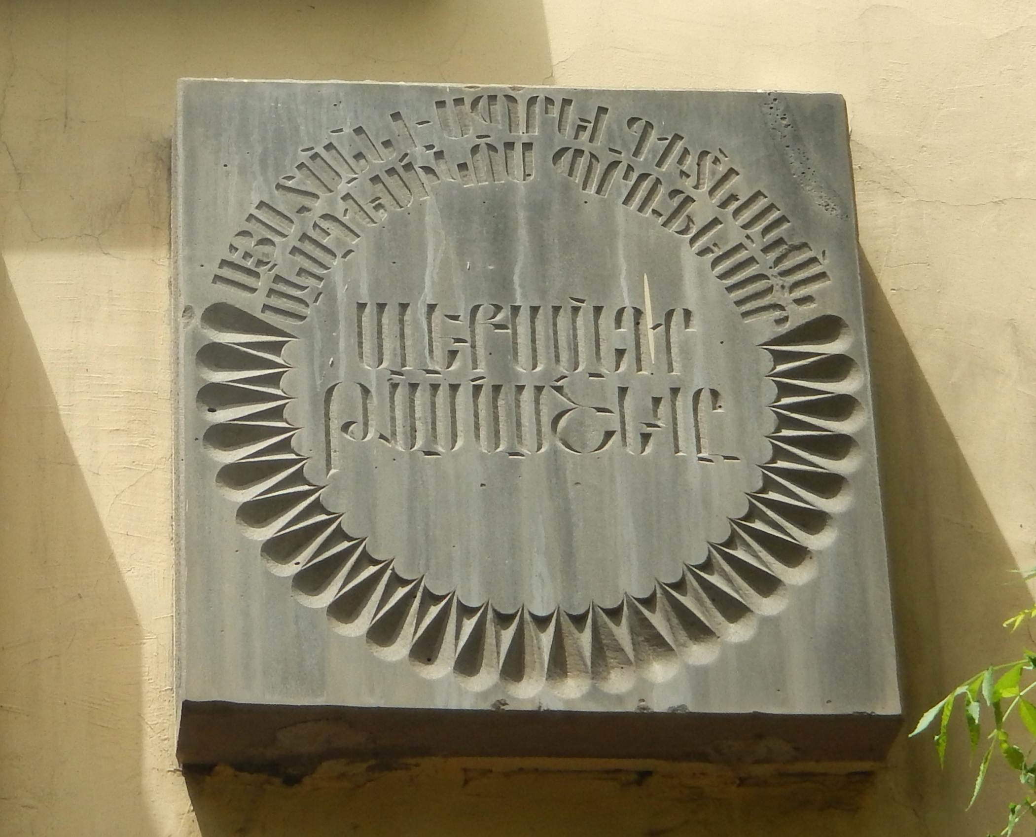 Alexandr Tamamshev's plaque